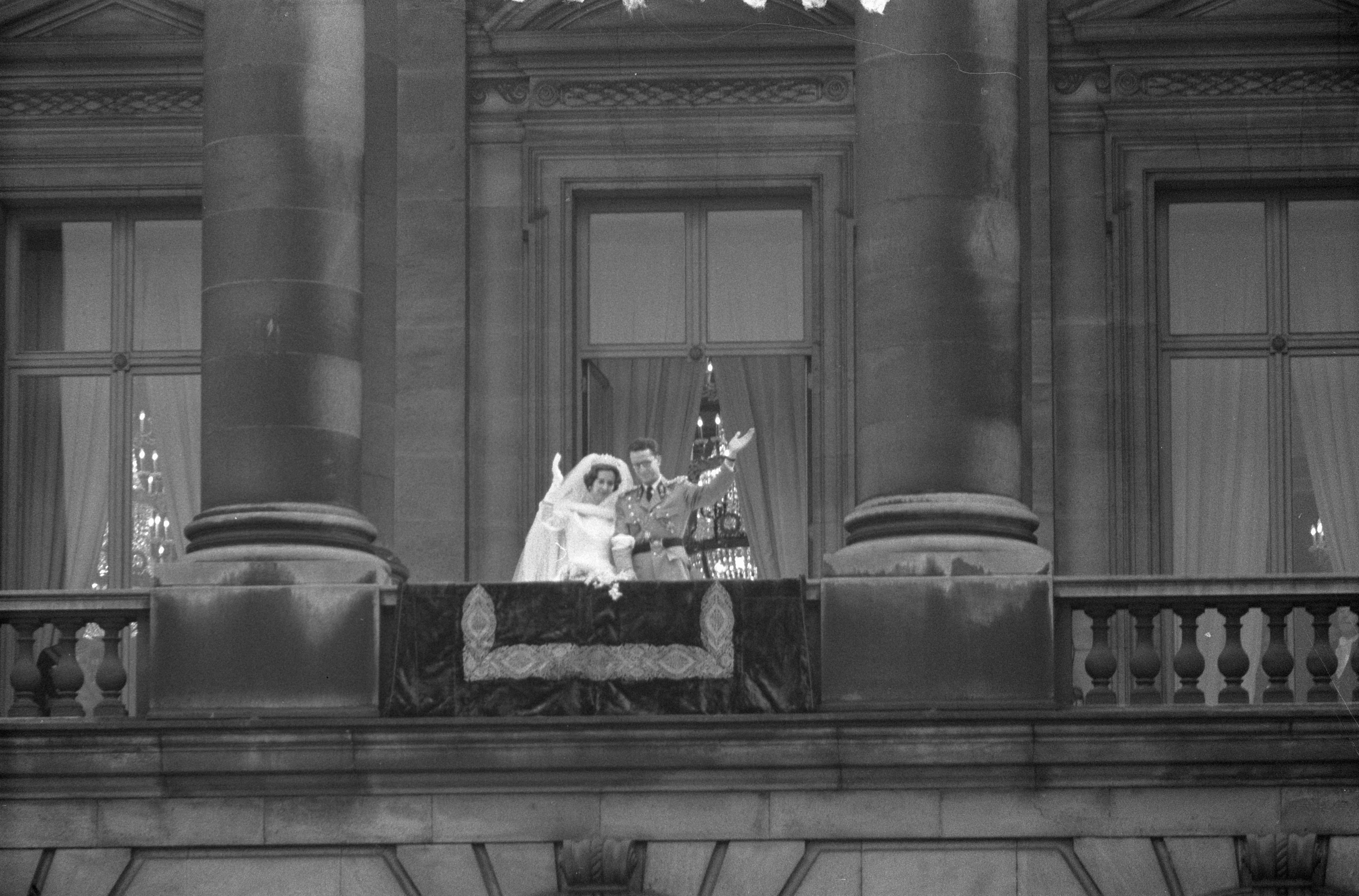 Collectie / Archief : Fotocollectie Anefo Reportage / Serie : [ onbekend ] Beschrijving : Vorstelijk huwelijk te Brussel, Boudewijn en Fabiola op het balkon Datum : 15 december 1960 Locatie : Brussel Trefwoorden : Vorstelijk, balkons, huwelijken Persoonsnaam : Boudewijn, Fabiola, koningin van België Fotograaf : Pot, Harry / Anefo Auteursrechthebbende : Nationaal Archief Materiaalsoort : Negatief (zwart/wit) Nummer archiefinventaris : bekijk toegang 2.24.01.05 Bestanddeelnummer : 911-8784